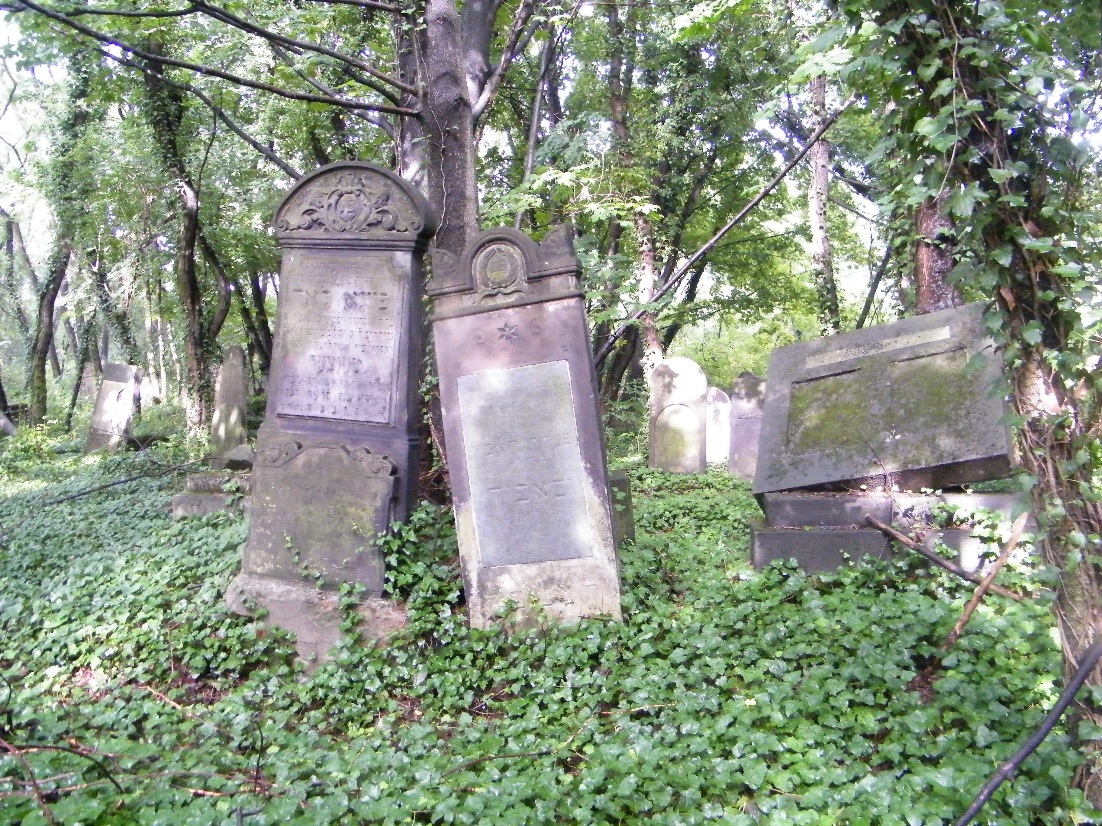 Cmentarz żydowski Częstochowa, ul. Złota, Częstochowa